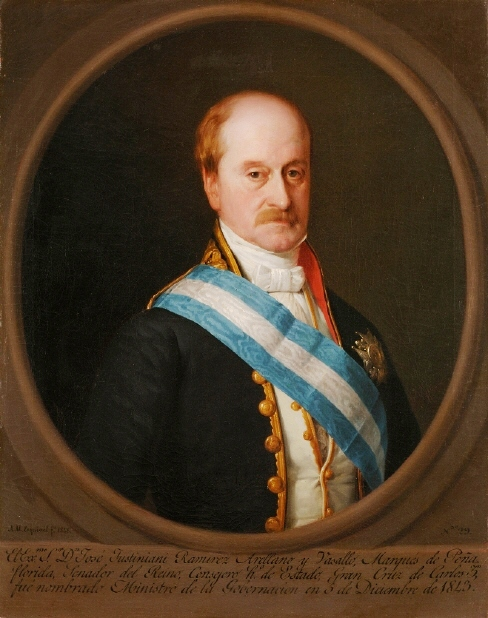 Retrato del político y aristócrata español José Justiniani Ramírez de Arellano (1800-1853), marqués de Peñaflorida y ministro de la Gobernación de la Península y alcalde de Madrid durante el reinado de Isabel II.